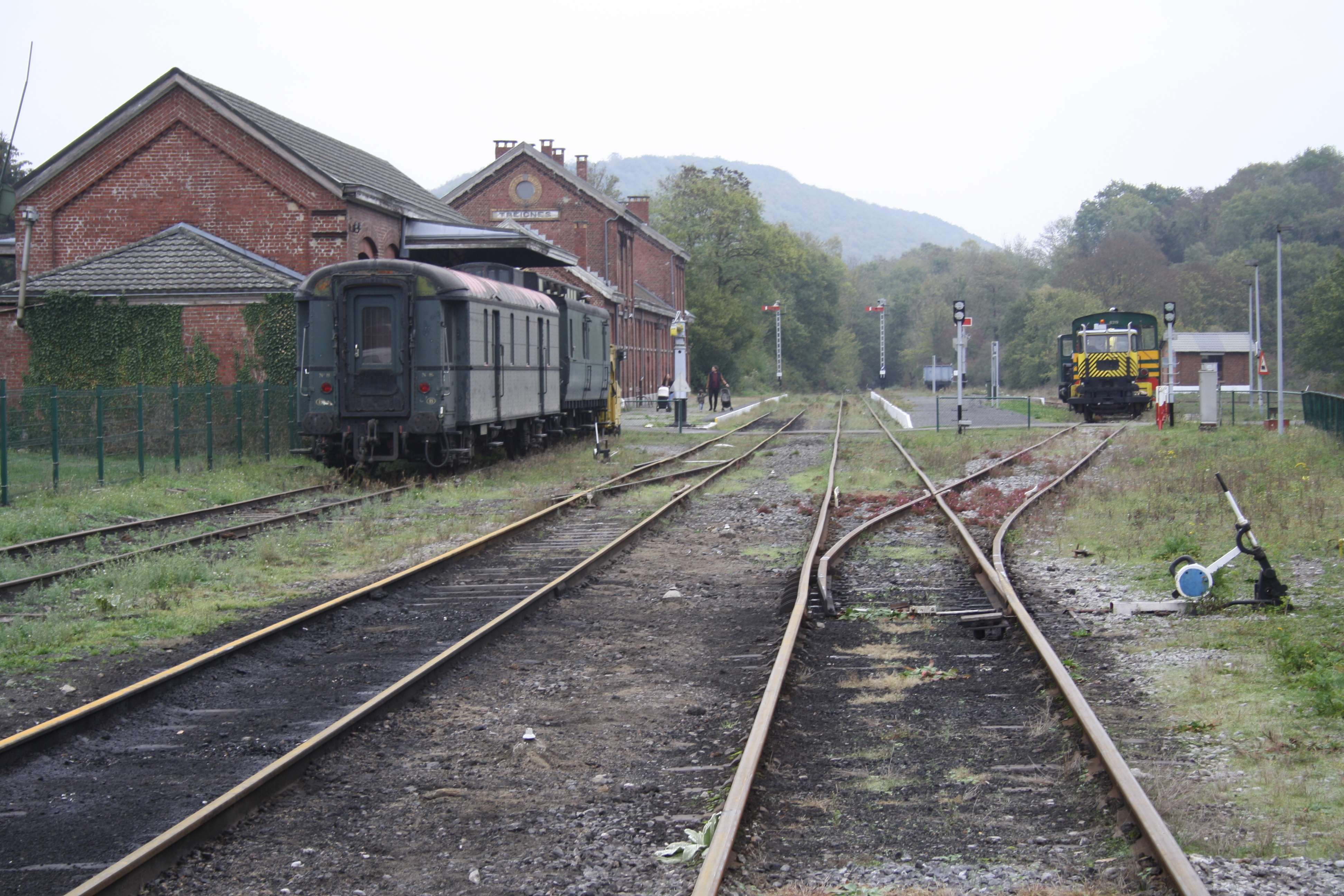 Gare de Treignes